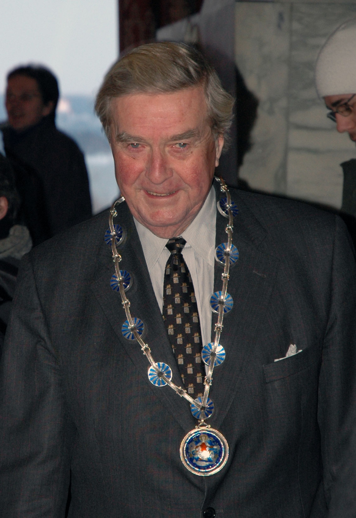 Ordfører Per Dietlev-Simonsen